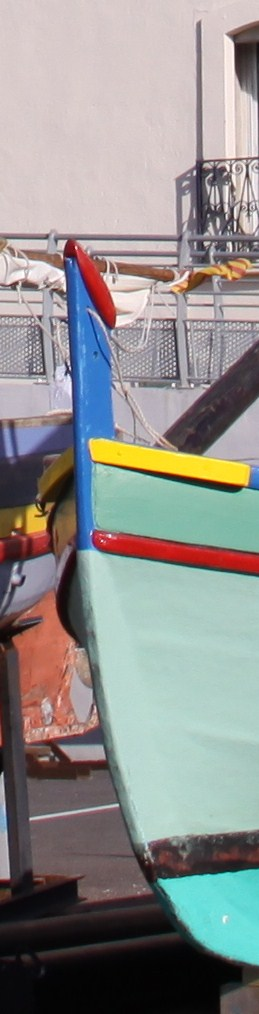 Un capion est une coiffe (souvent peinte en rouge) fixée au sommet d' une étrave d'un pointu comme, ici, une barque catalane. En l' espèce, capion de la barque catalane "La Bepa" PV 130416. Banyuls-sur-Mer, Pyrénées-Orientales, France.